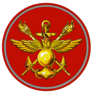 Нарукавная нашивка